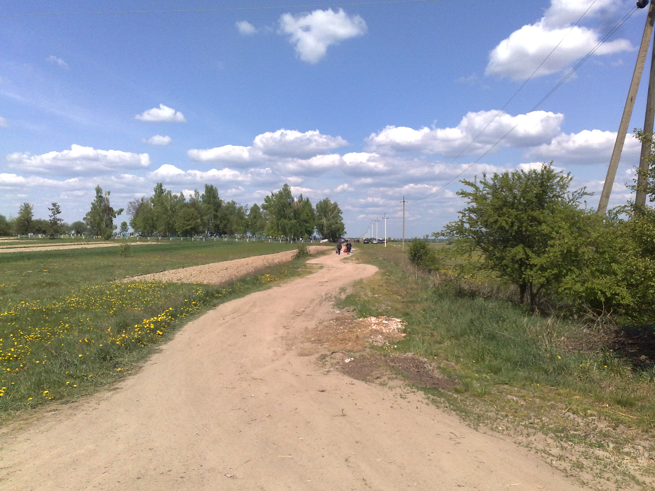 Дорога з Костюшок до Овруча